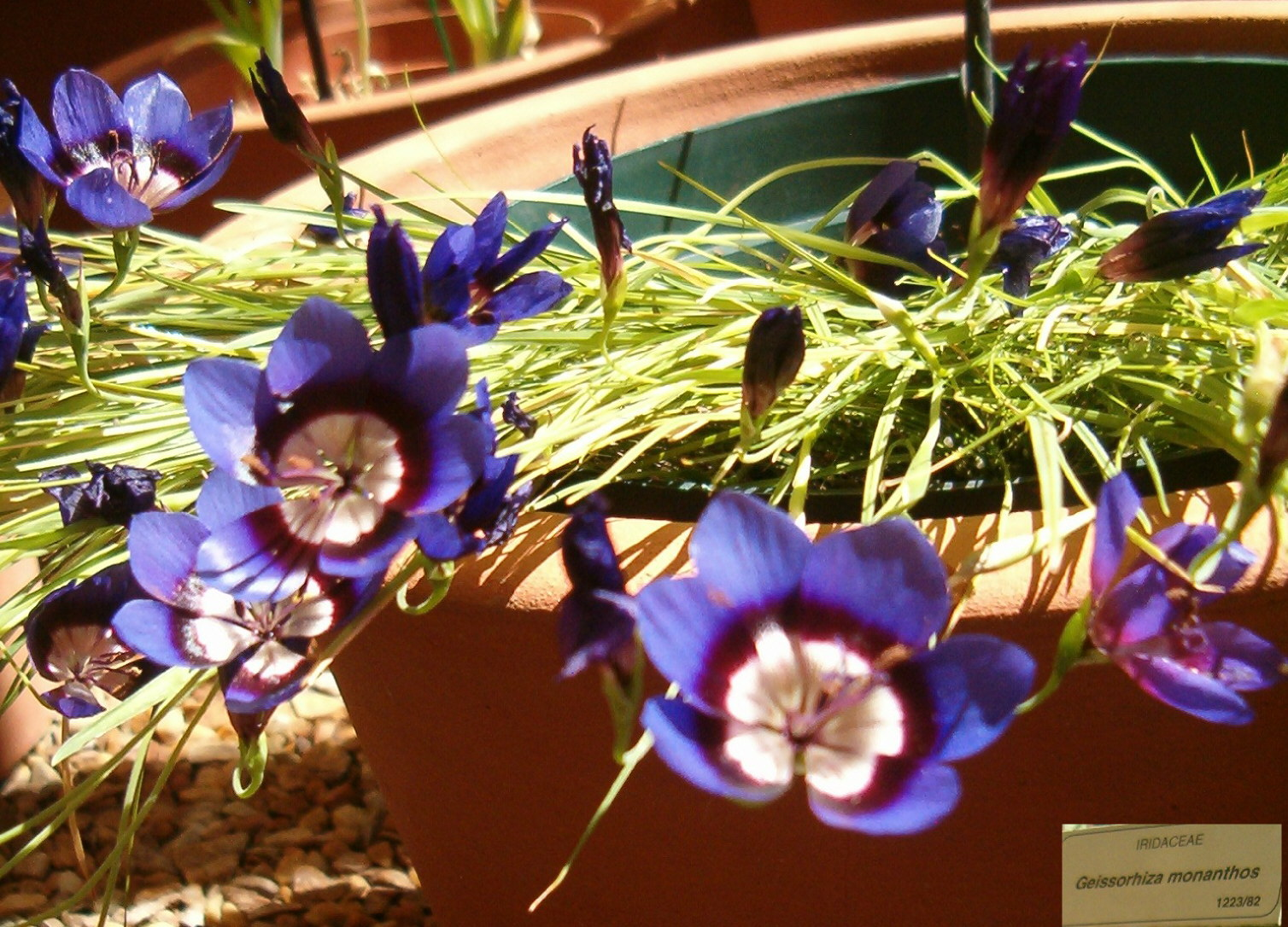 At Kirstenbosch National Botanical Gardens Genus Geissorhiza